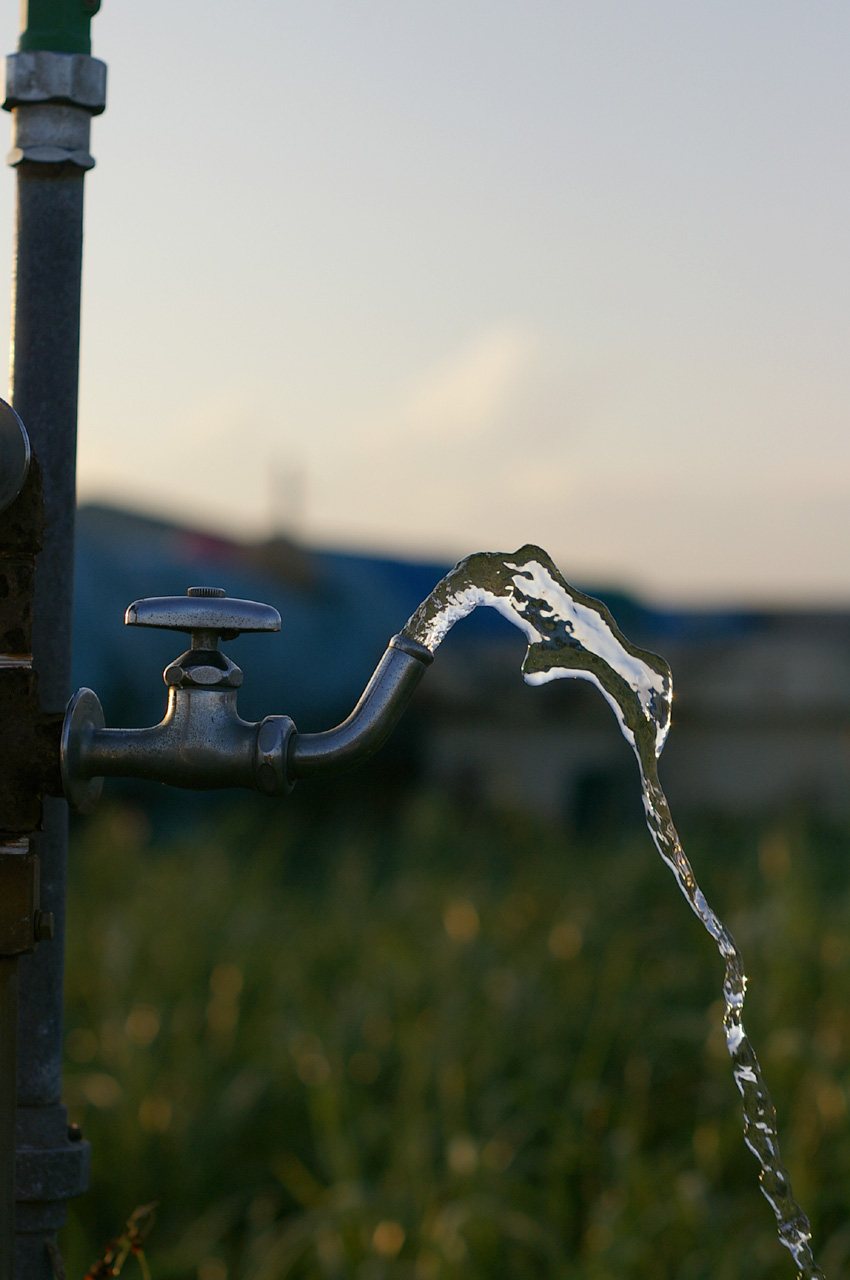 Outdoor water faucet (tap) in Hokkaido, Japan